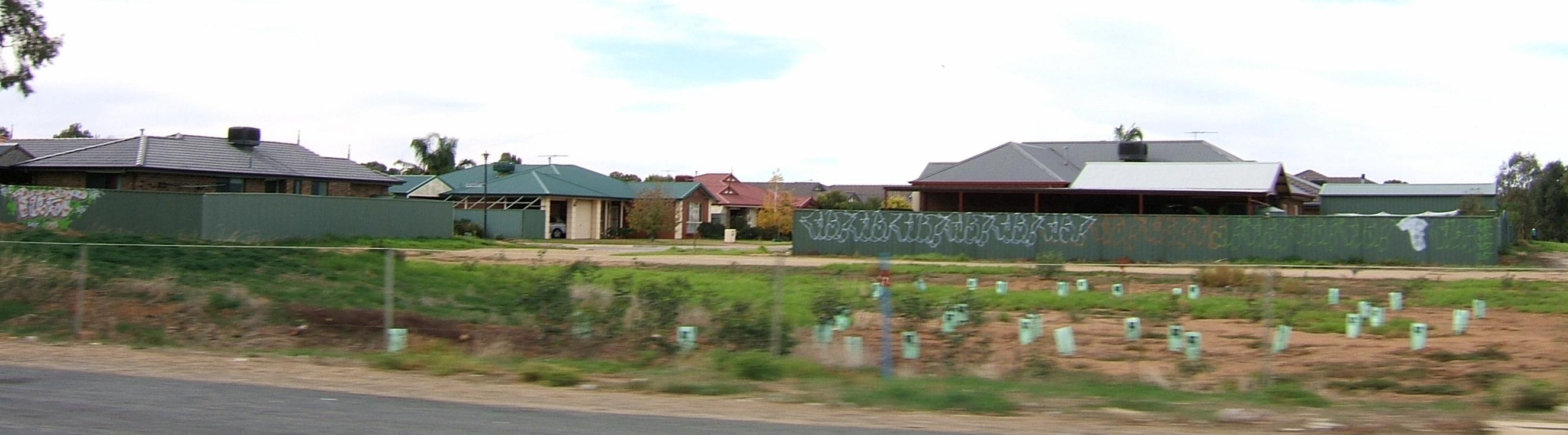 PAralowie, Adelaide